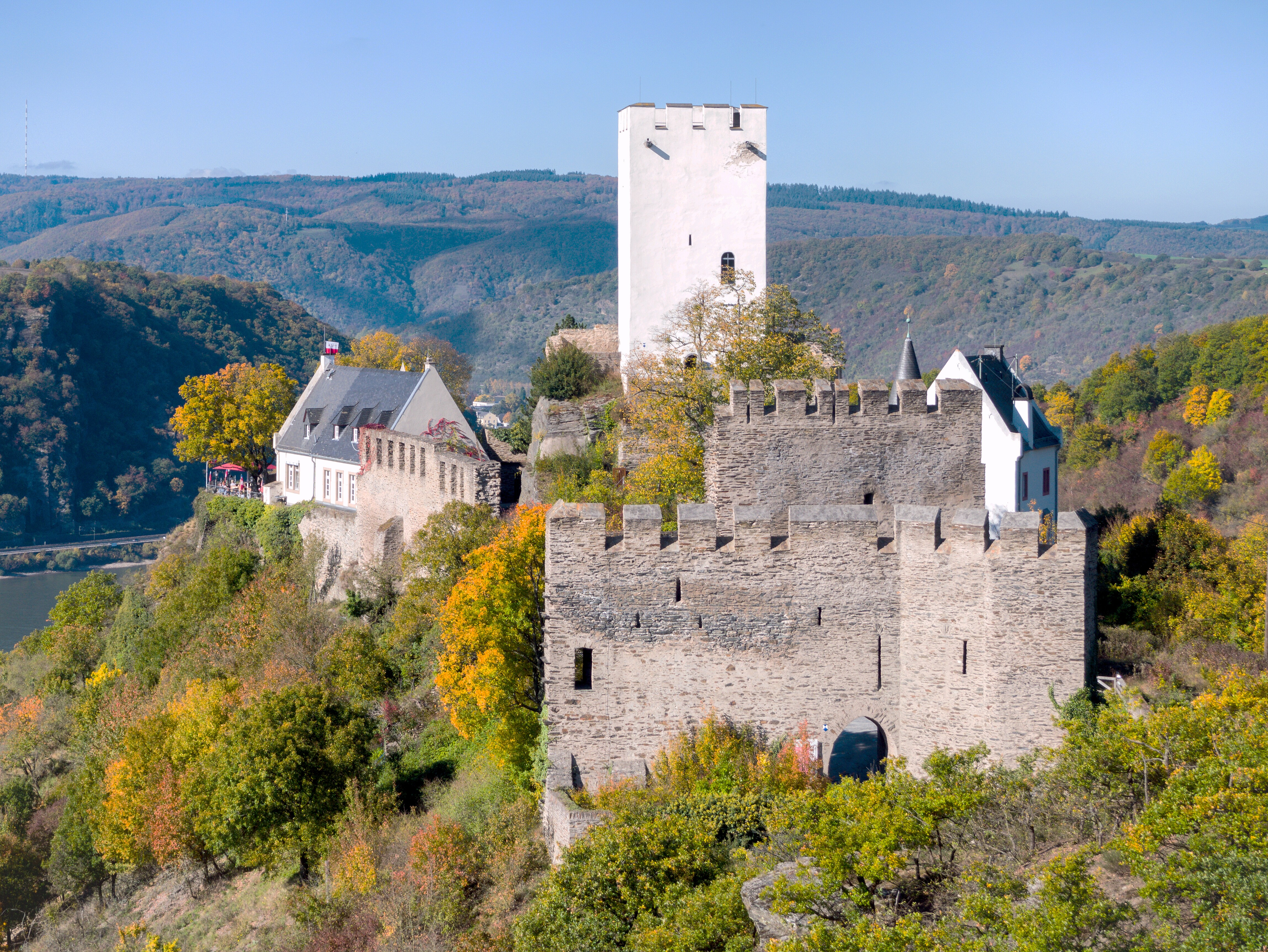 Zur Angriffsseite wird Burg Sterrenberg durch zwei Schildmauern geschützt. Die jüngere äußere Schildmauer ist 9,30m hoch, die ältere innere 12m hoch.